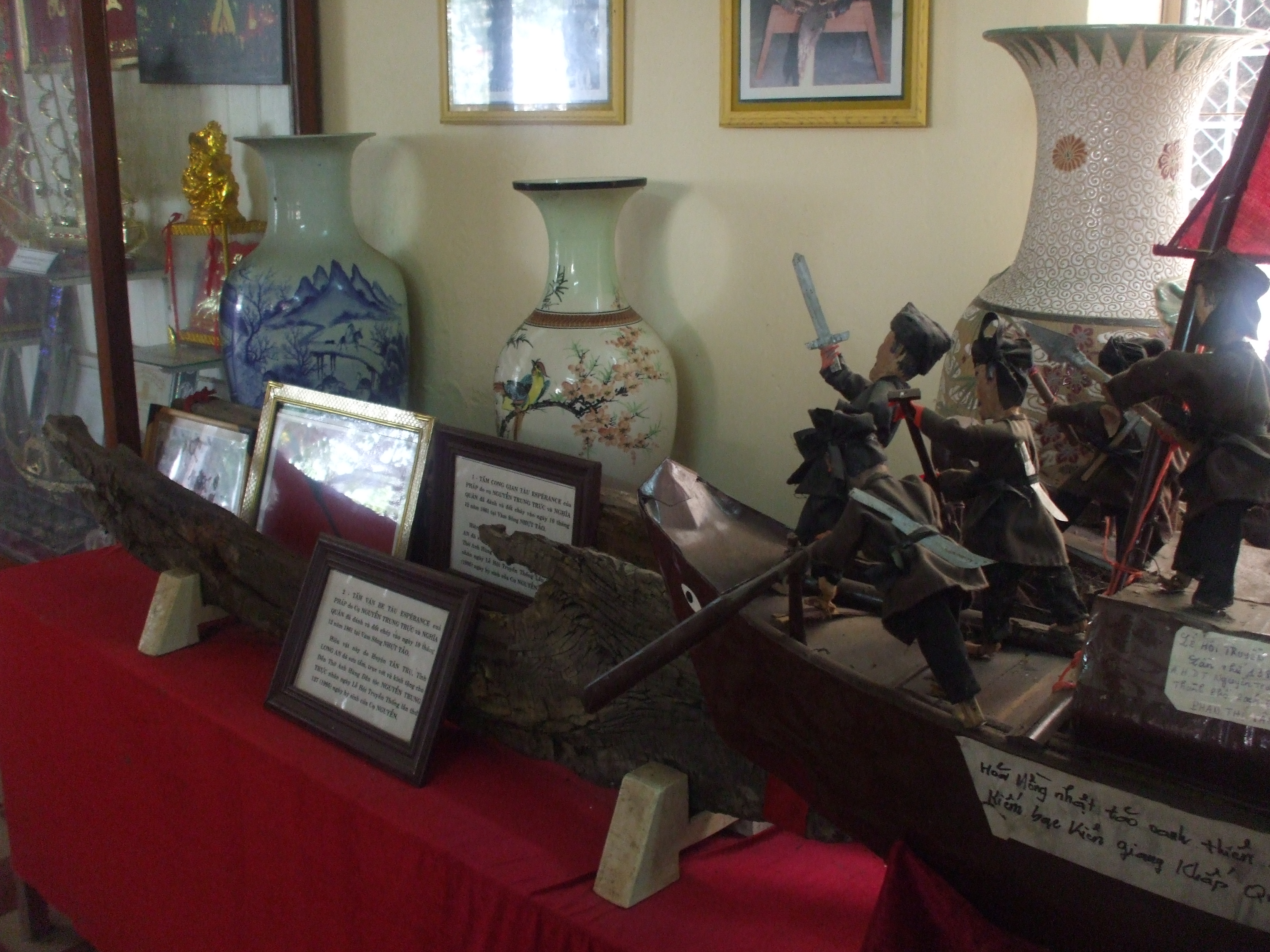 Mảnh ván tàu Espérance, được trưng bày tại đền thờ chính, TP. Rạch Giá, tỉnh Kiên Giang, Việt Nam.